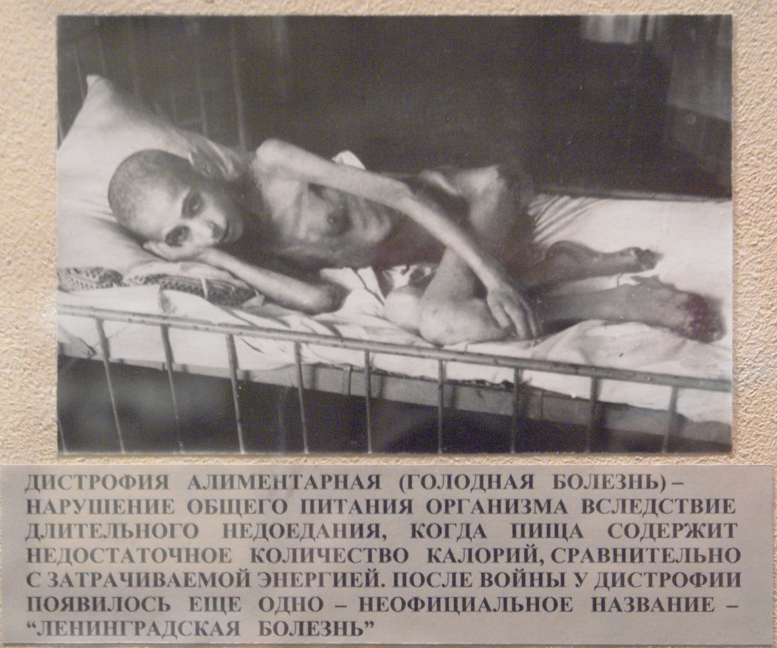 Больная дистрофией. Музей блокады Ленинграда